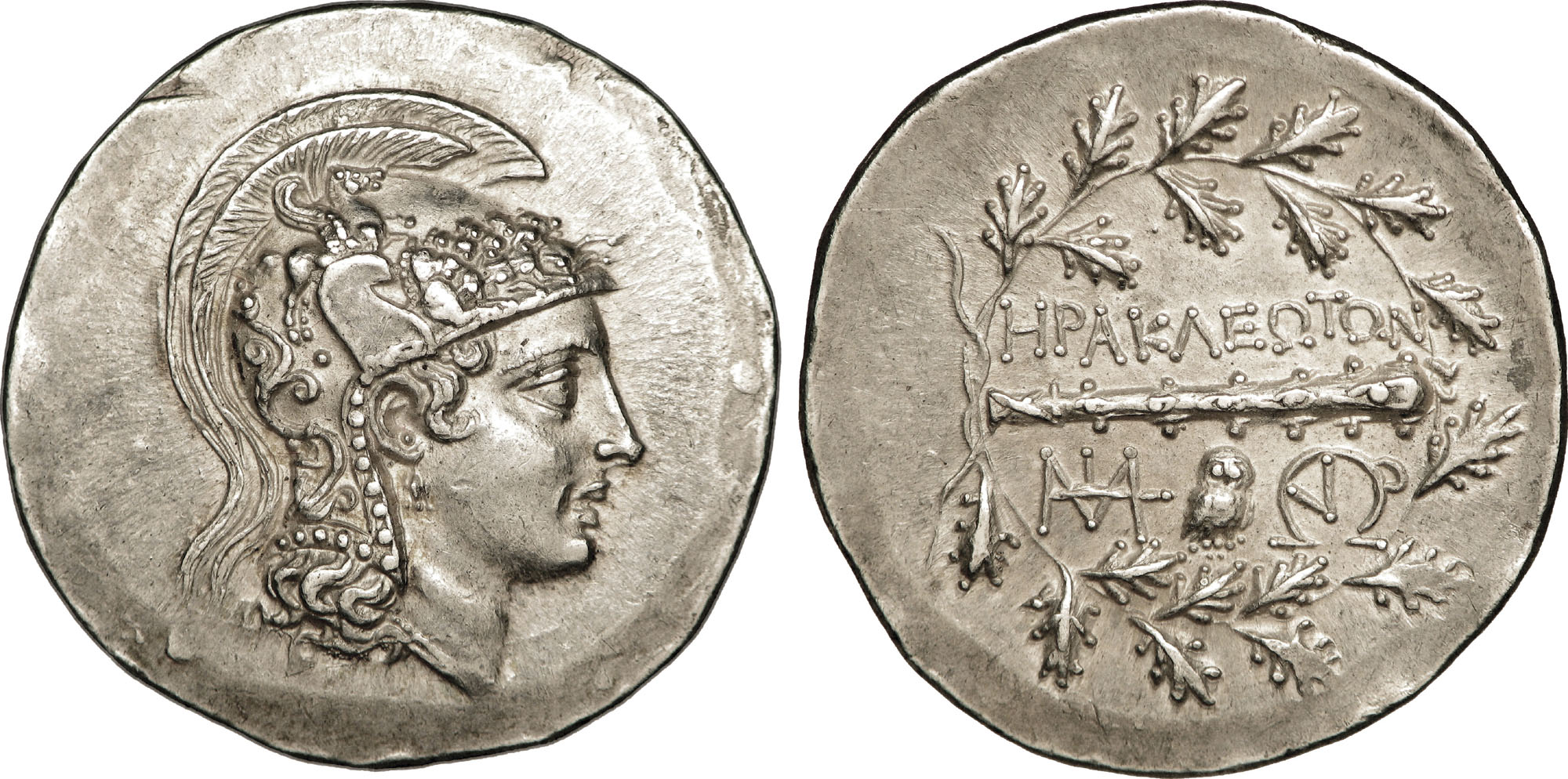 Nom de l'atelier : Ionie, Héraclée du Latmum Métal : argent Diamètre : 32,5mm Axe des coins : 9h. Poids : 16,81g. Titulature avers : Anépigraphe. Description avers : Tête casquée d'Athéna à droite, coiffée du casque attique à cimier et à triple aigrette, orné d'un Pégase volant et de quatre protomés de chevaux. Description revers : Massue dans une couronne de chêne ; au-dessous de la massue, petite chouette debout de face et deux monogrammes complexes. Légende revers : HRAKLEWTWN/ (MIAT) - (WUR) Traduction revers : (d’Héraclée).